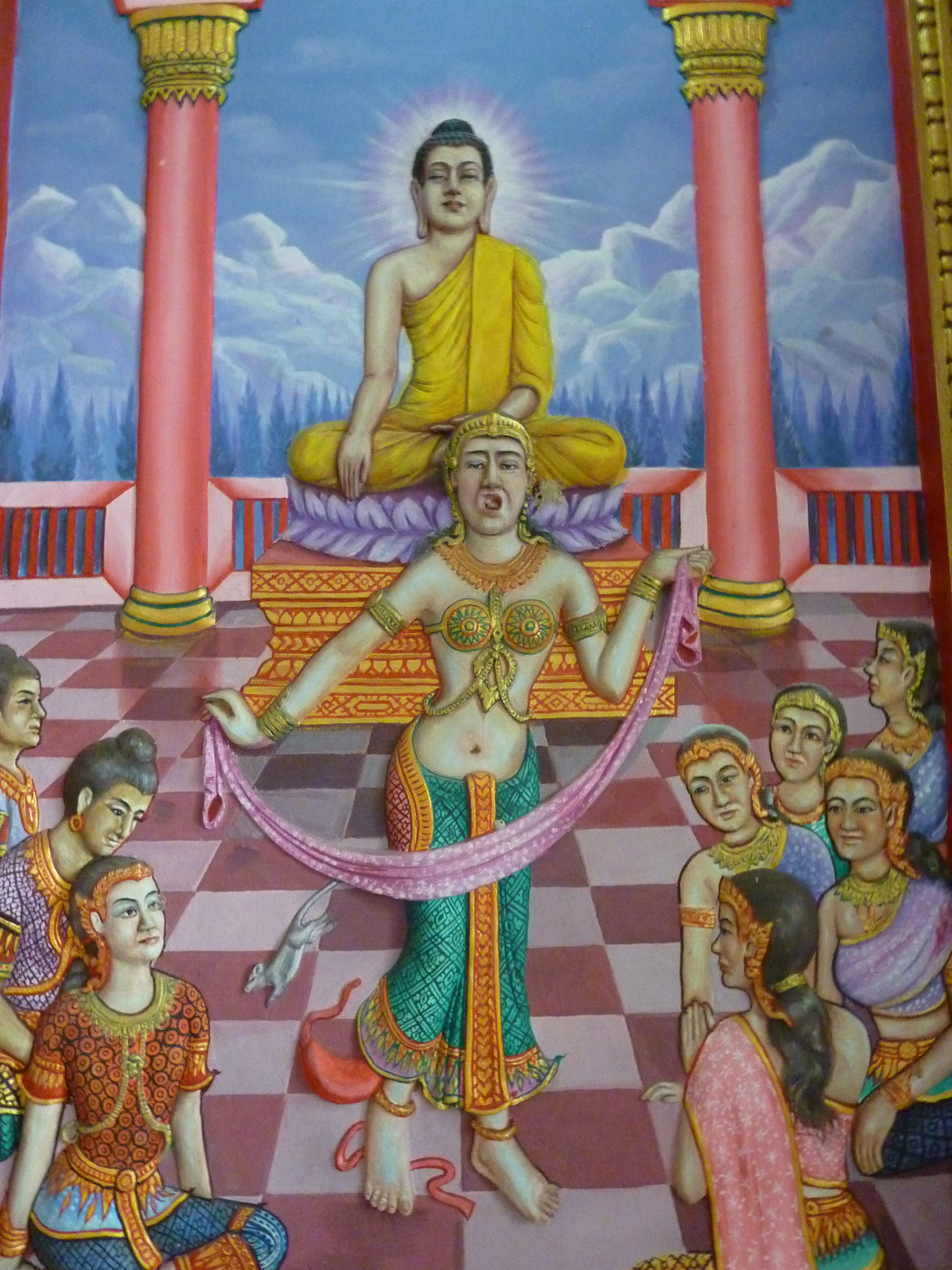 Wat Machiram, Tumpat, Malaysia